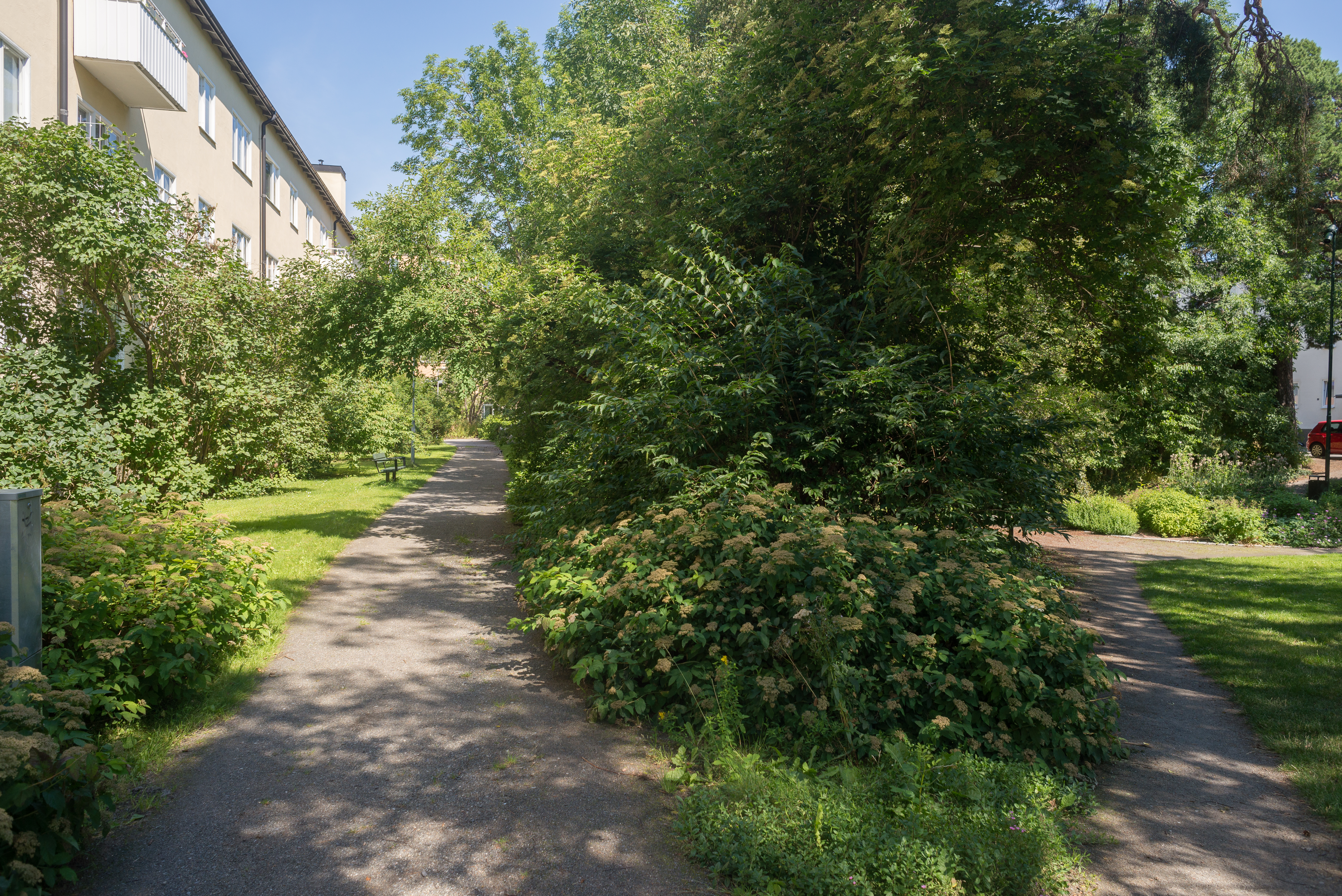 Gård på fastigheten Humlan 4 i Hammarbyhöjden, Stockholm. Till vänster Humlan 4 (hus 1).